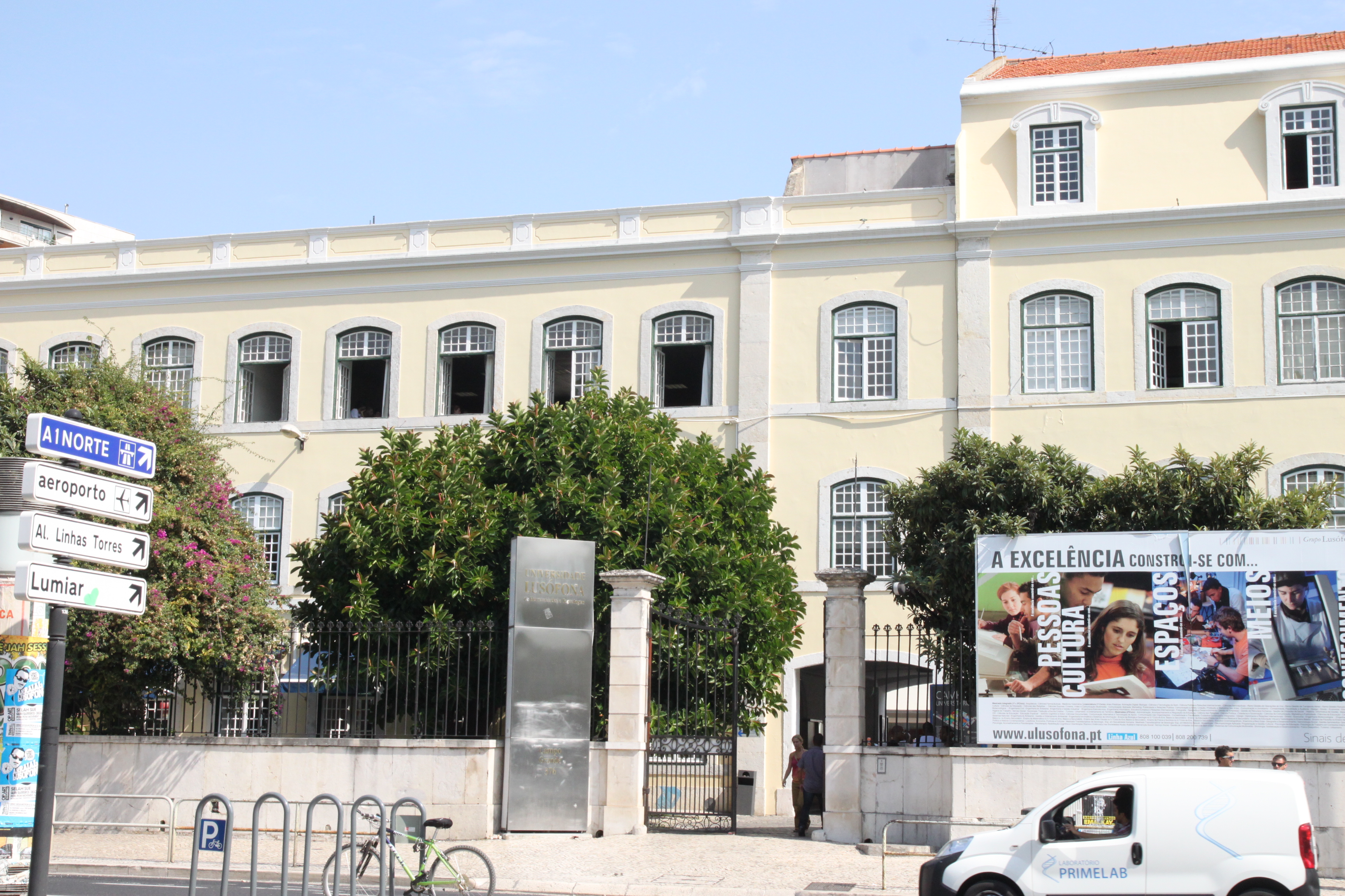 Fábrica de Fiação e Tecidos / Quartel do Regimento de Engenharia n.º 2 / Edifício da Universidade Lusófona This file was uploaded for Wiki Loves Monuments in Portugal with the unique identifier 97019958.